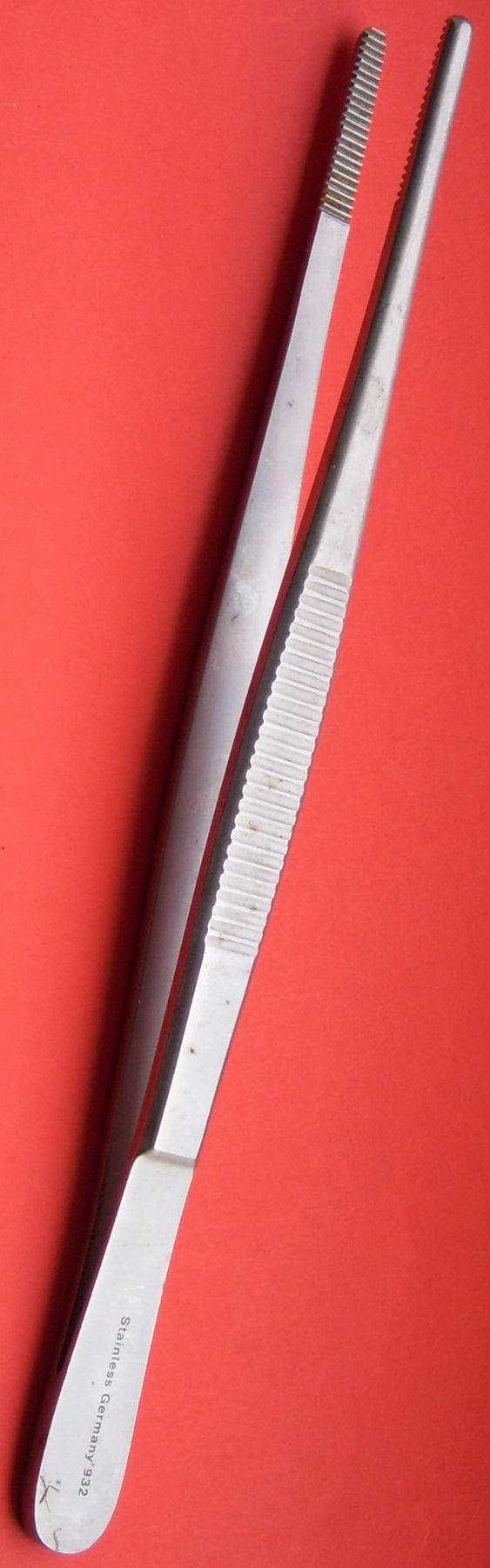 Anatomical Tweezer